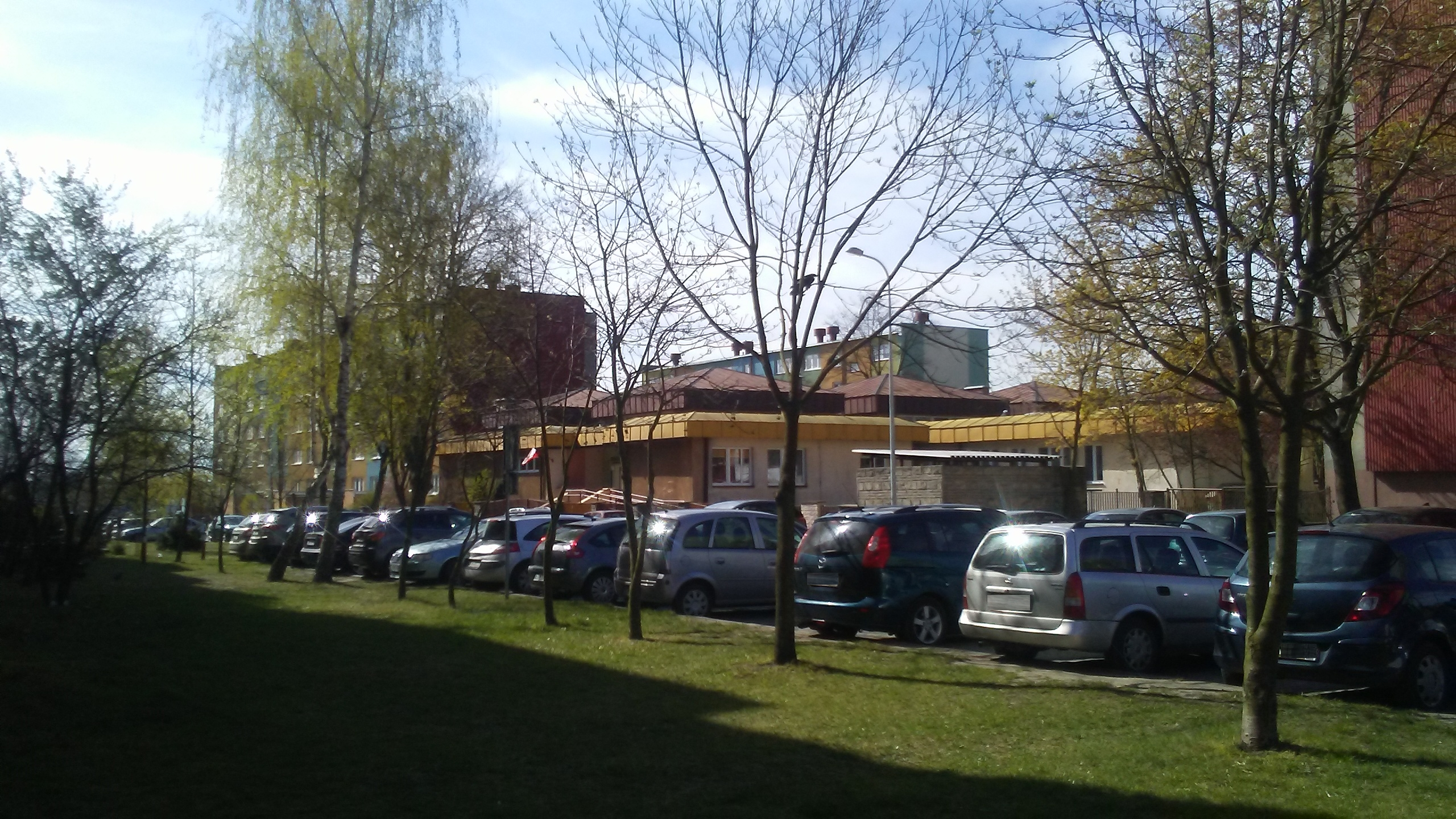 Publiczne przedszkole przy ulicy Sikorskiego 6A w Tomaszowie Mazowieckim, osiedle Hubala I